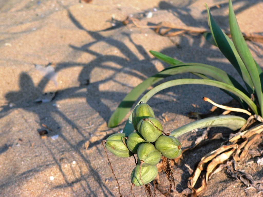 Пясъчната лилия